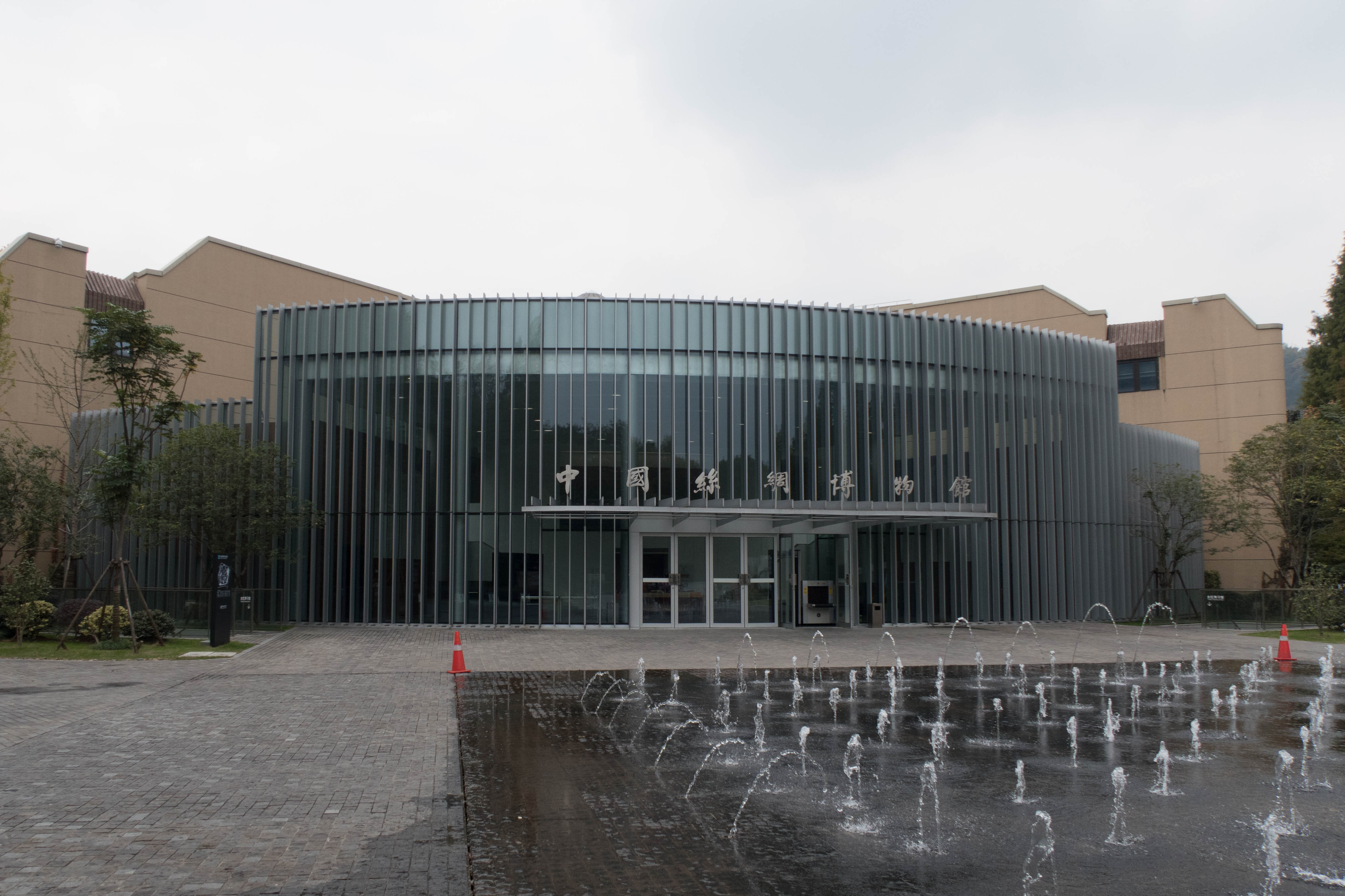 中国丝绸博物馆